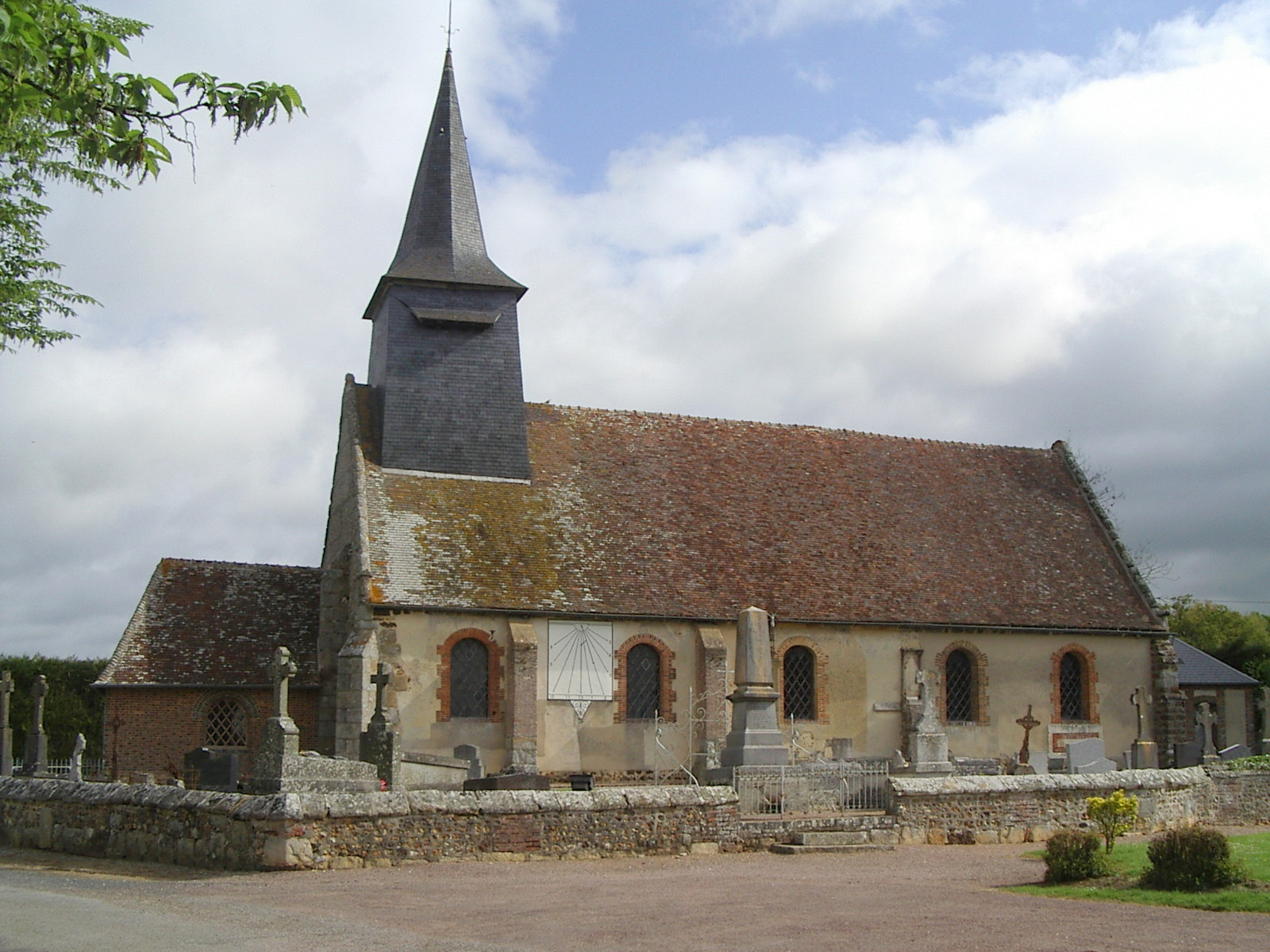 Eglise de St-Pierre-du-Mesnil (France, Eure)